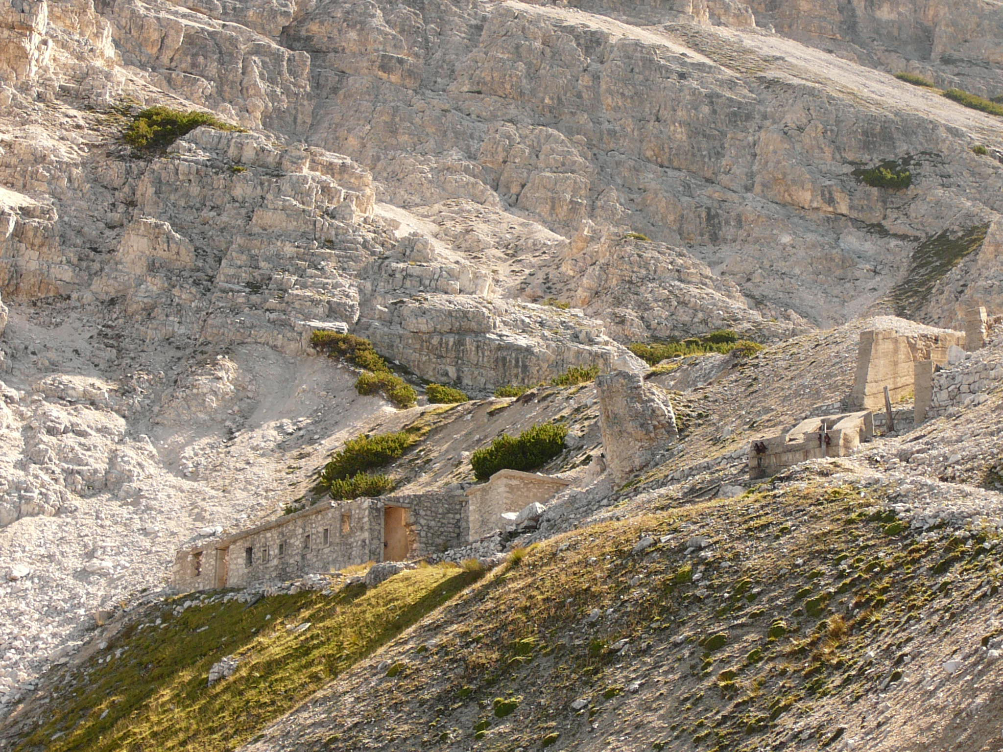 Monte Rudo, prima caserma